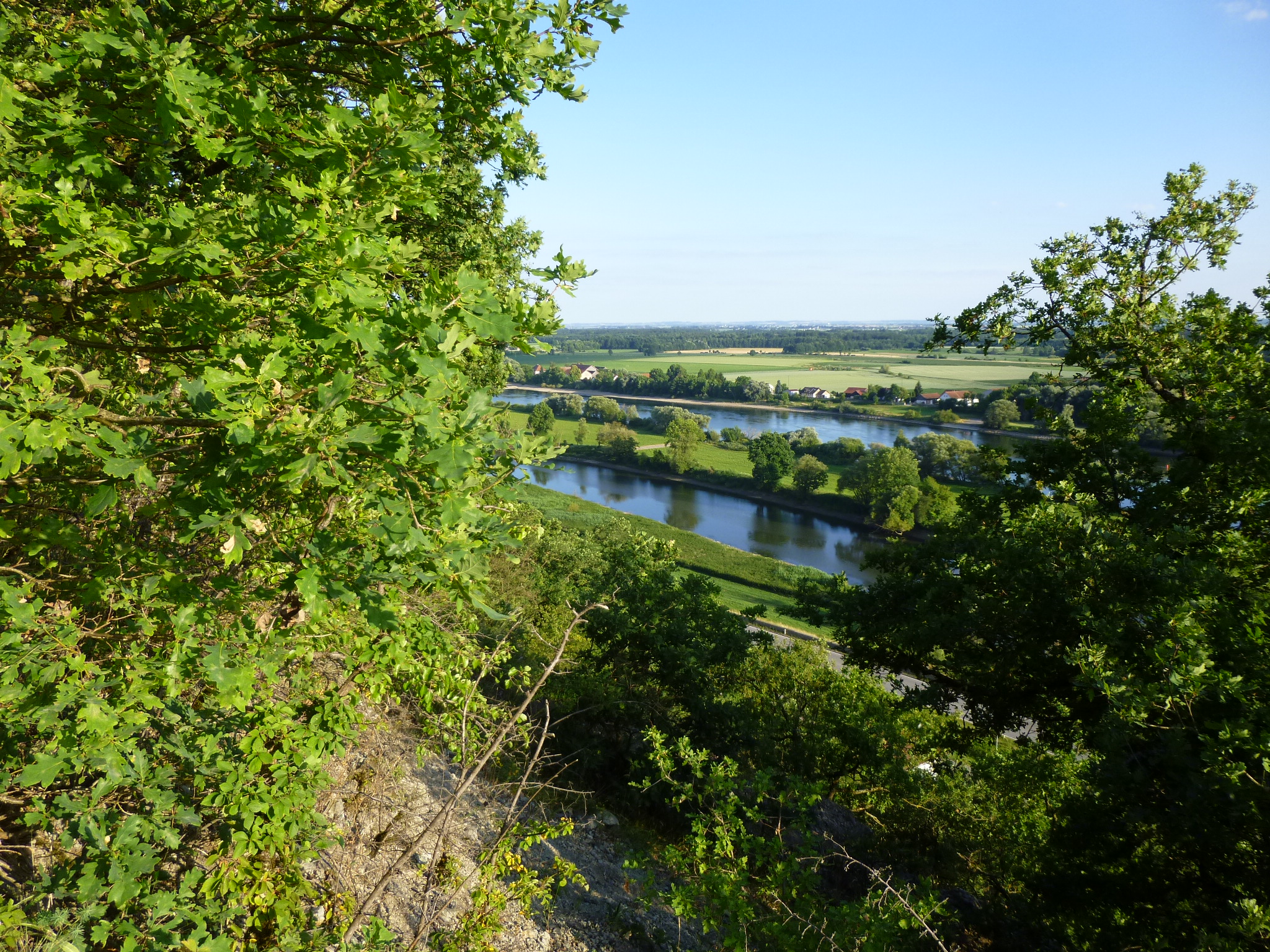 Blick vom Lippweg auf die Donauebene vom Steilhang des Bogenberges aus gesehen – Naturschutzgebiet „Bogenberg“ (Steilhang im Vordergrund) und FFH-Gebiet „Donauauen zwischen Straubing und Vilshofen“ (Donau-Altarm und Wörth) – im Hintergrund am Donauufer der Ort Hermannsdorf (Gemeinde Aiterhofen)